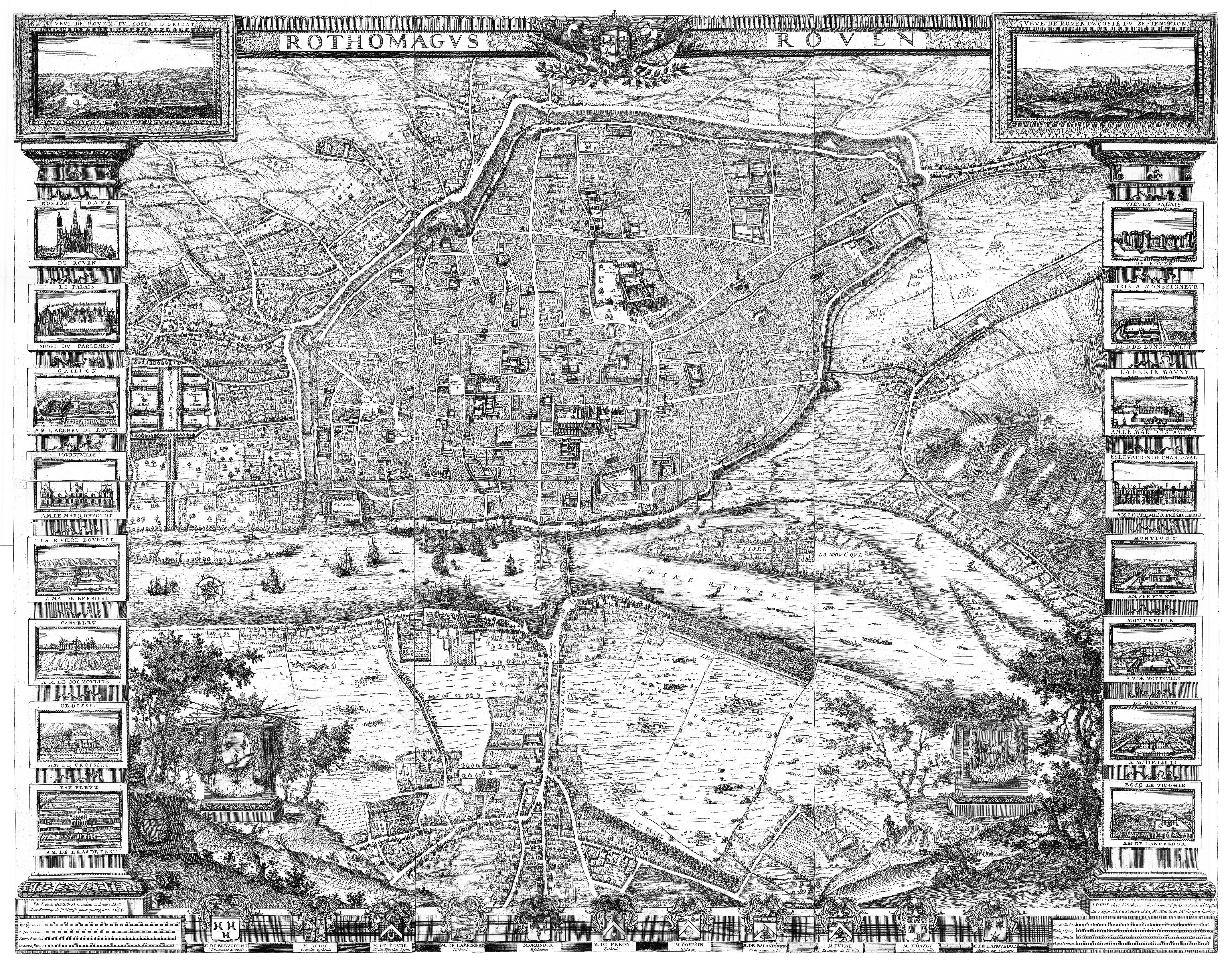 Plan de Rouen, réalisé par Gomboust en 1655.